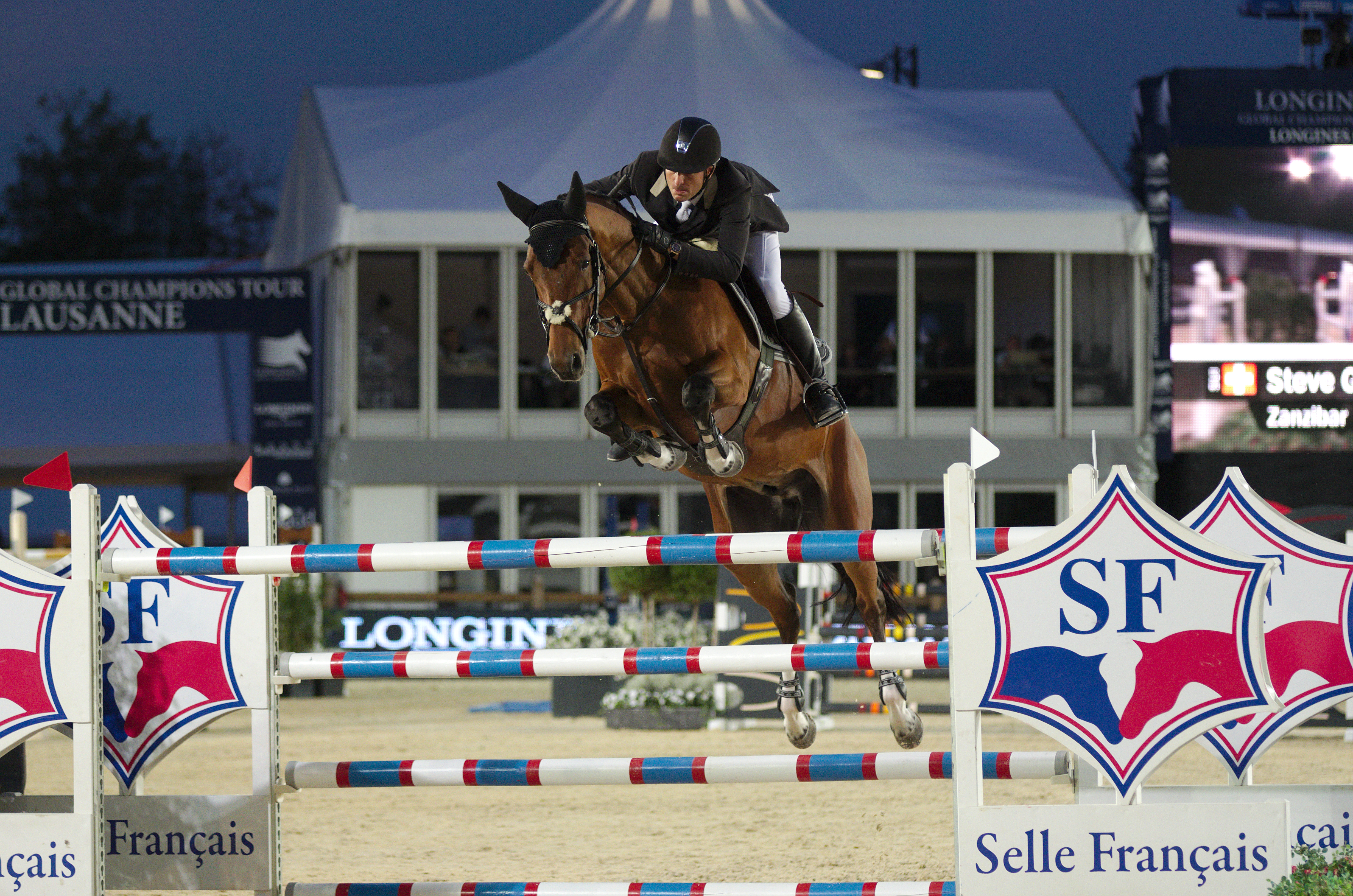 2013 Longines Global Champions - Lausanne - 14-09-2013 - Steve Guerdat et Zanzibar